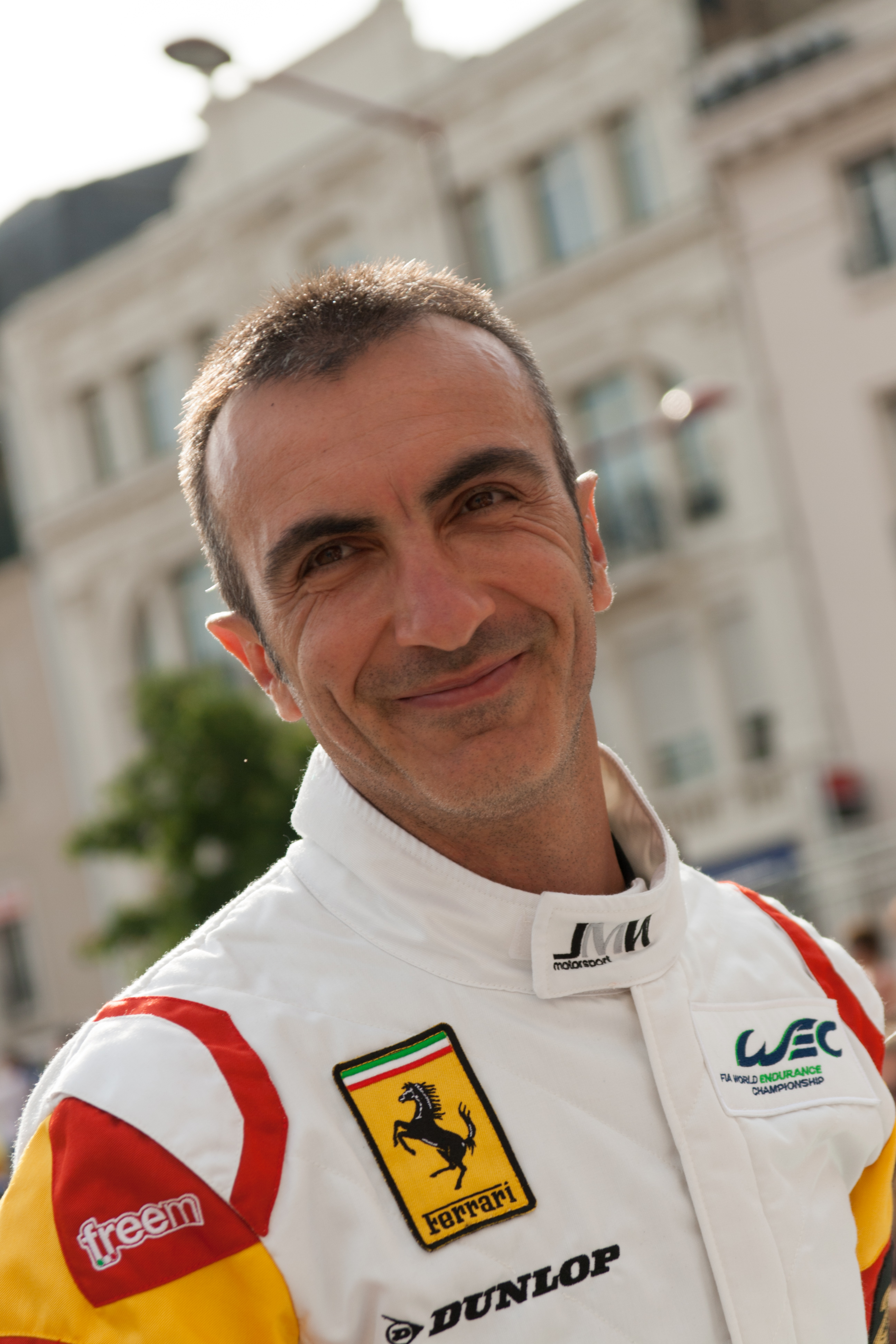 Andrea Bertolini lors du Pesage aux 24H du Mans 2013